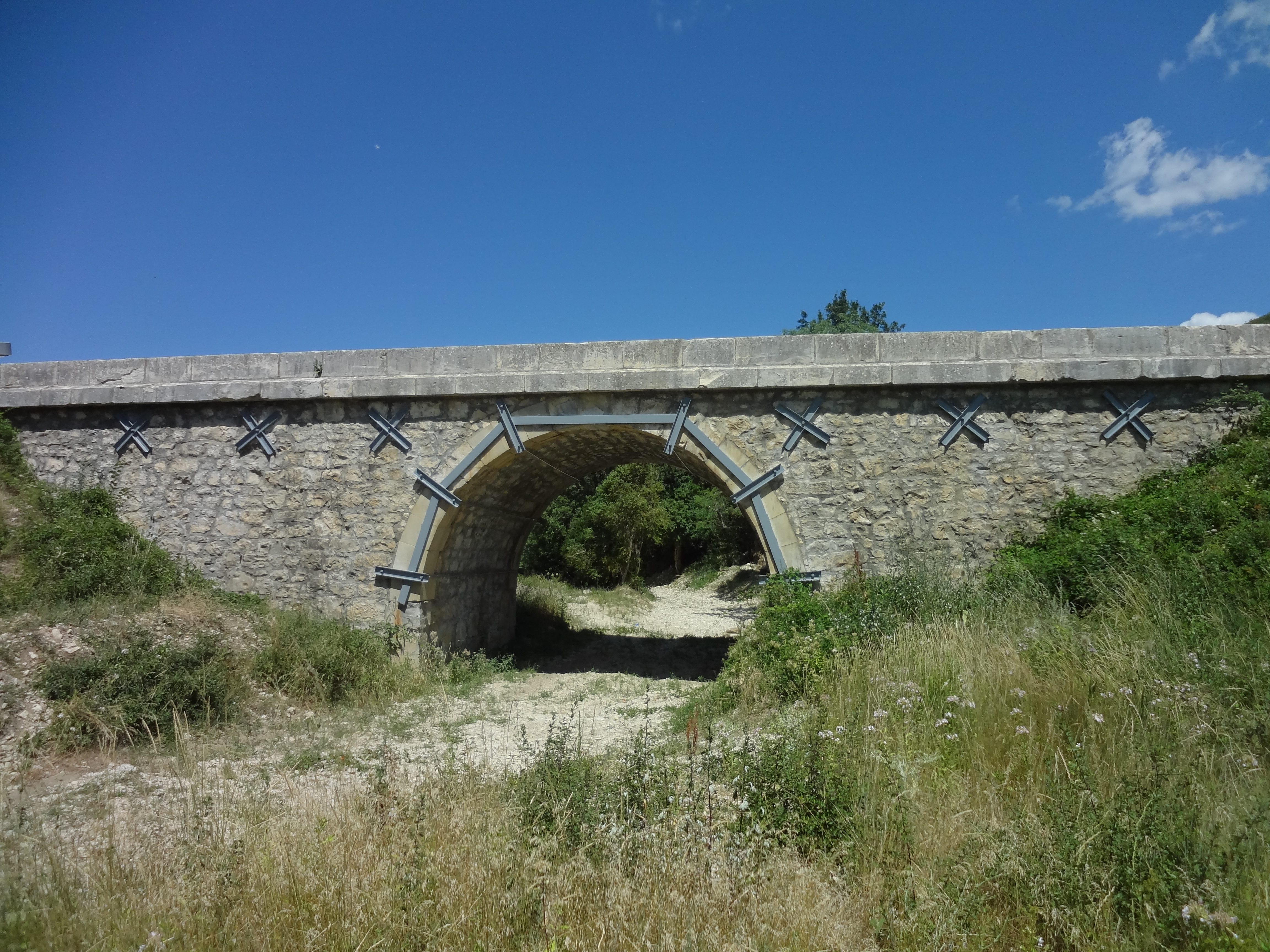 Pont sur le Largue, aval du hameau de Largue, Banon